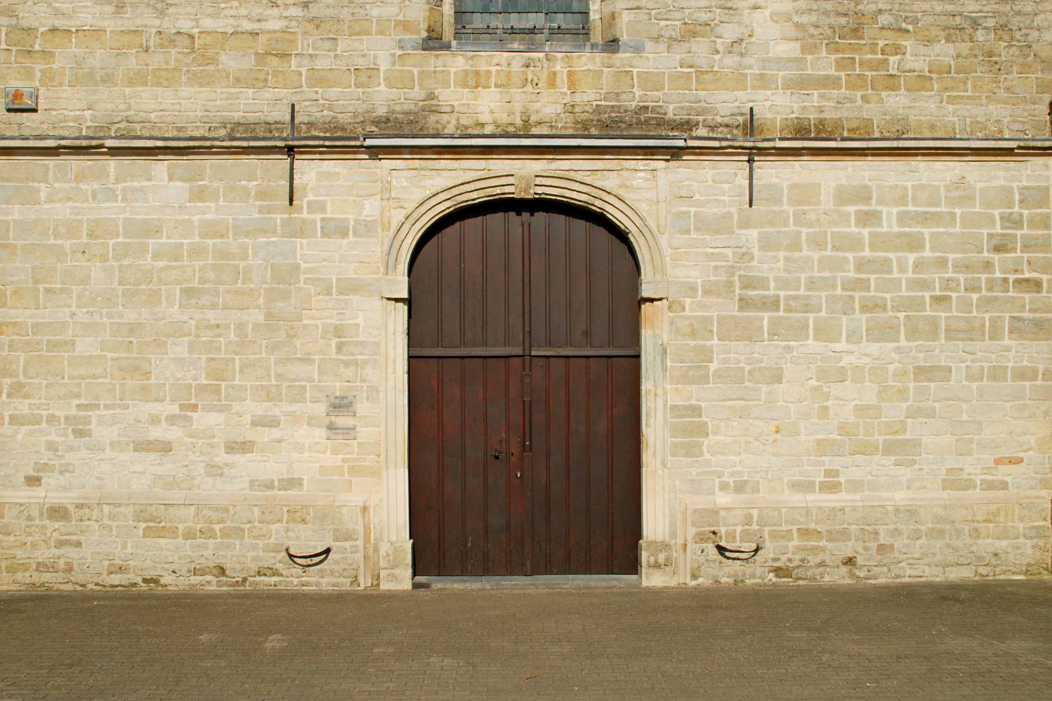 Belgique - Brabant flamand - Zellik - Église Saint-Bavon This photo of immovable heritage has been taken in the Flemish Region